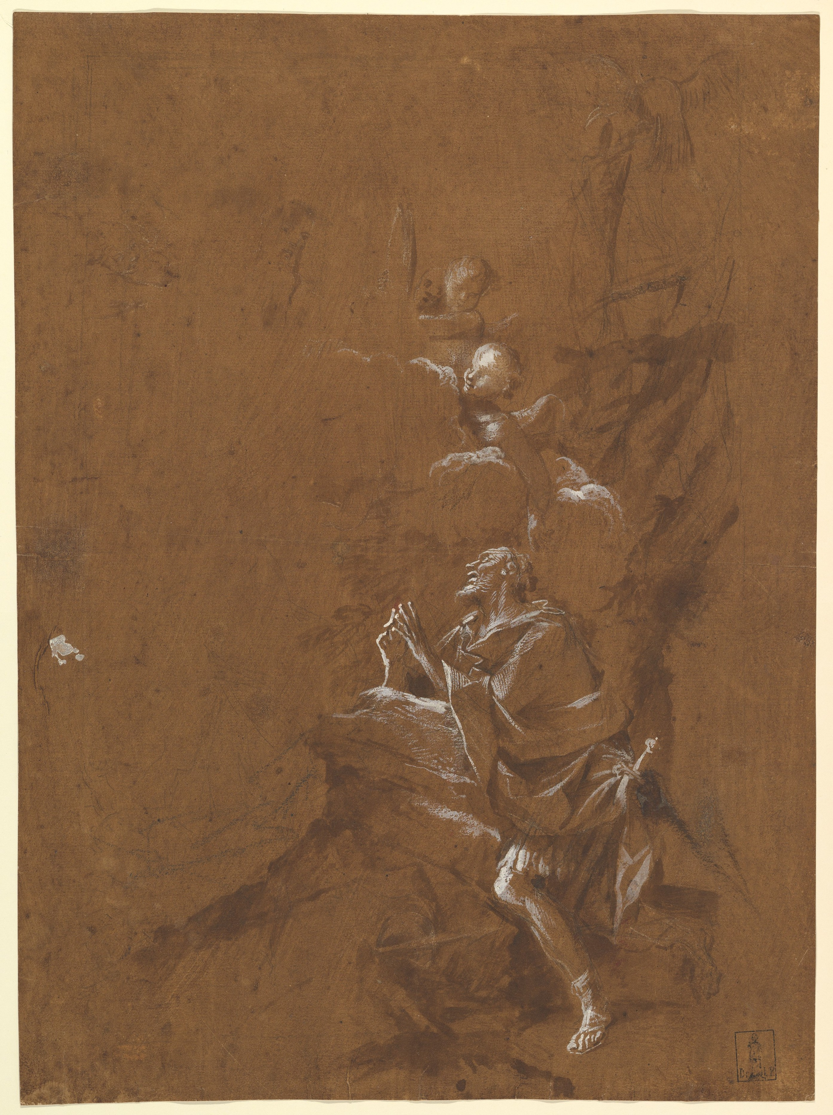 Drawing; Drawings